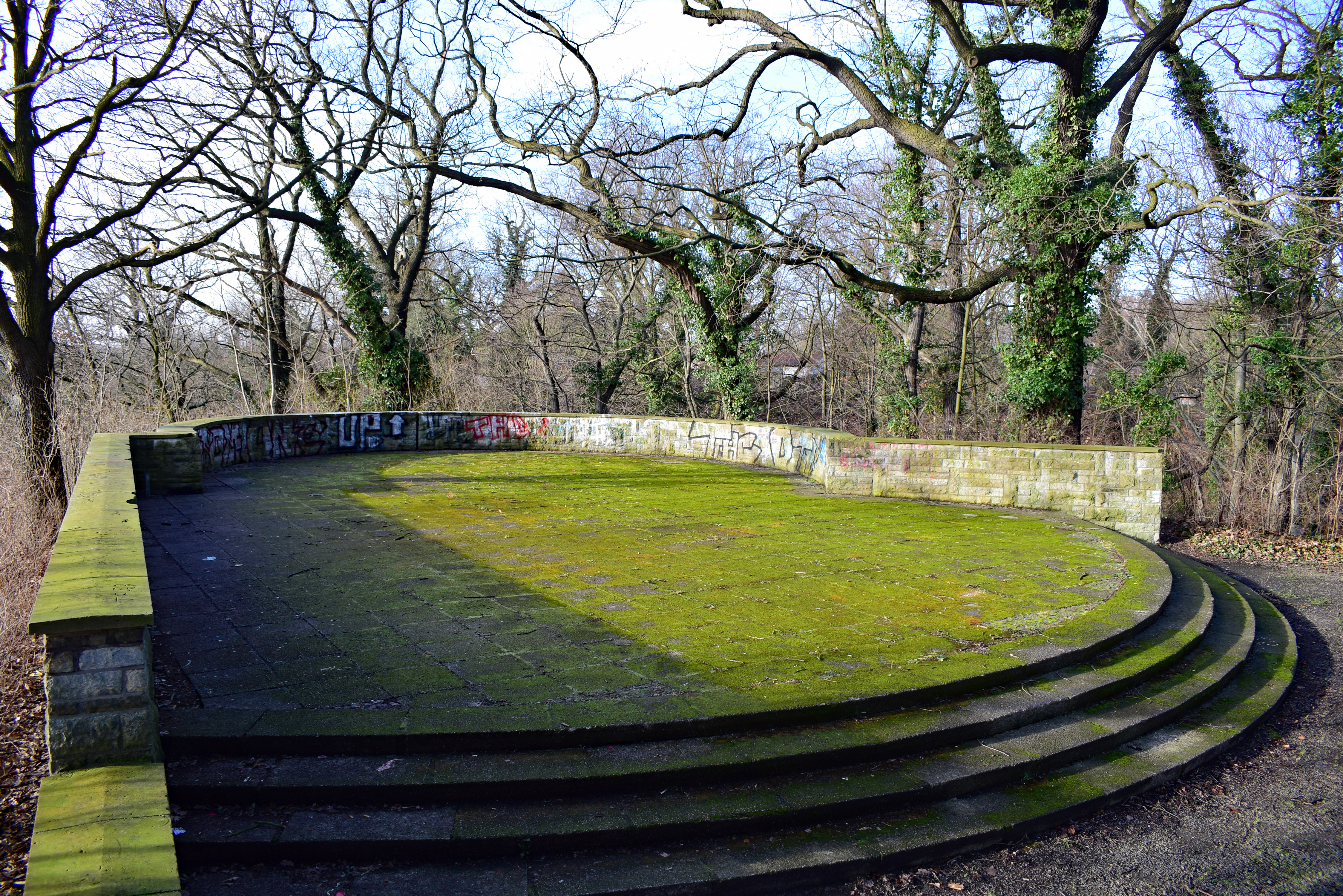 Standort des Obelsiken 1870/71 mit der in der 1970er Jahren errichteten Aussuchtsplattform (Bastion)